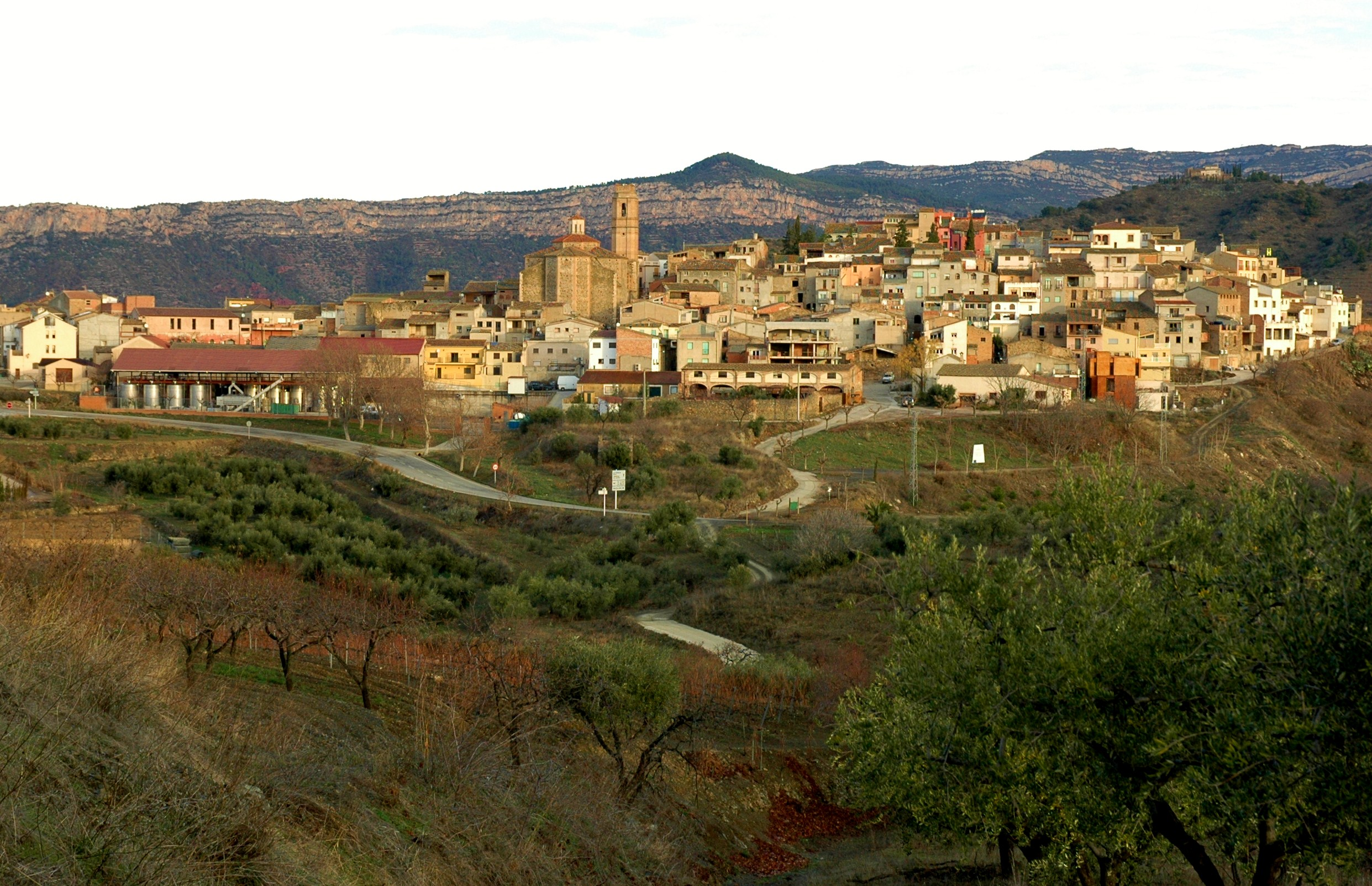 Gratallops des de les Obagues